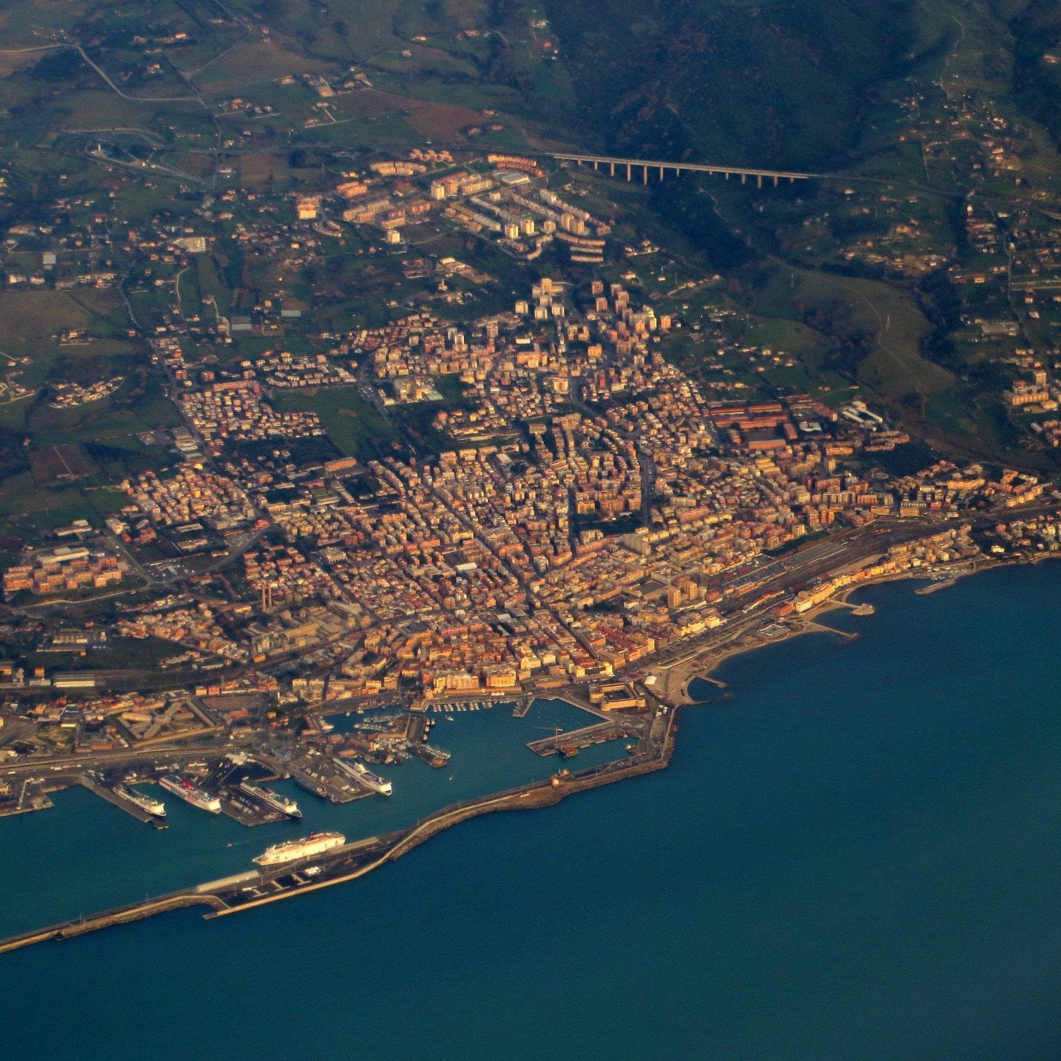 Veduta aerea di Civitavecchia